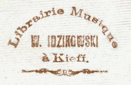 Шрифтовой штемпель книжного магазина Владислава Леоновича Идзиковского